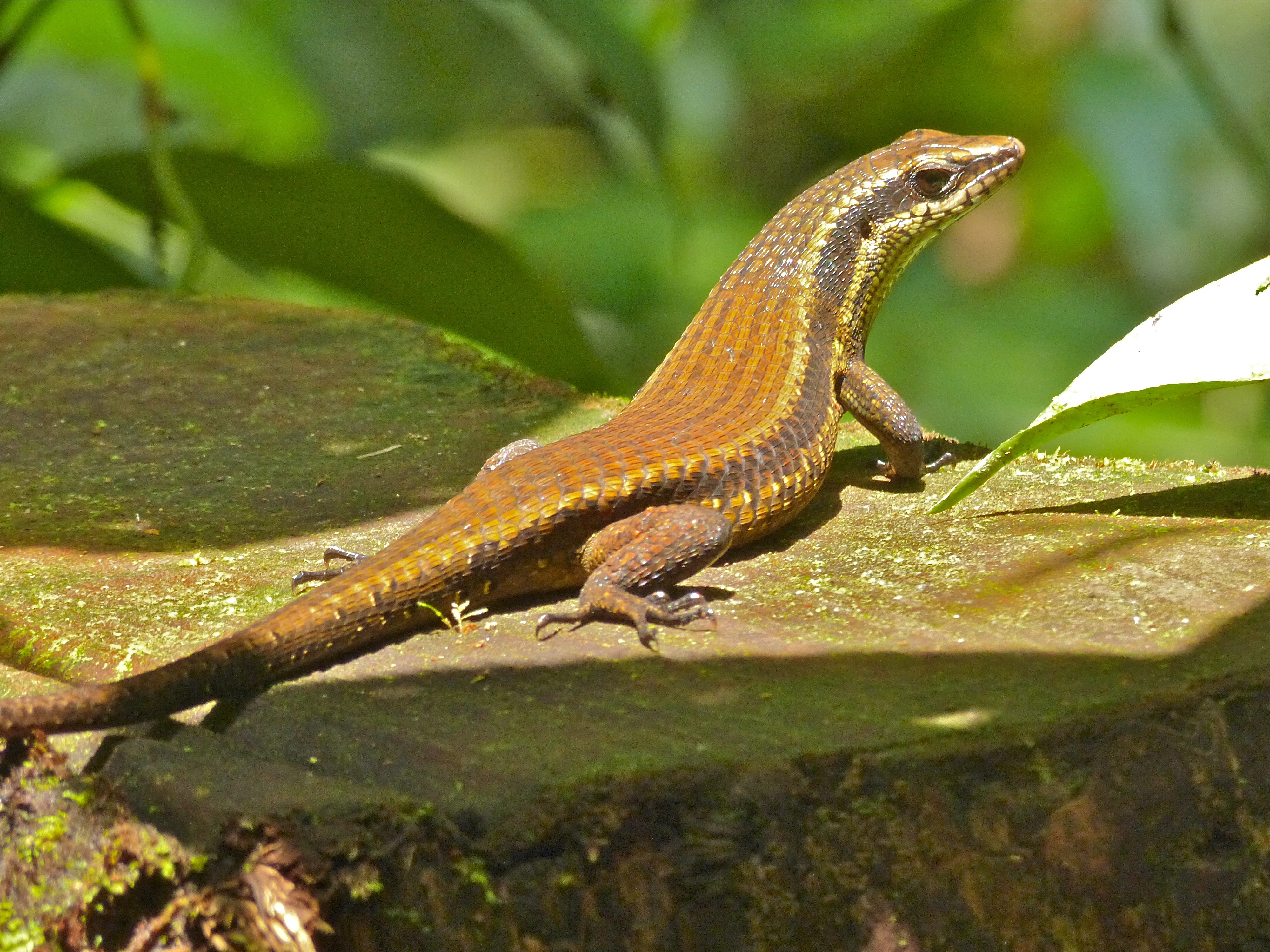 Gunung Mulu NP, Sarawak, MALAYSIA